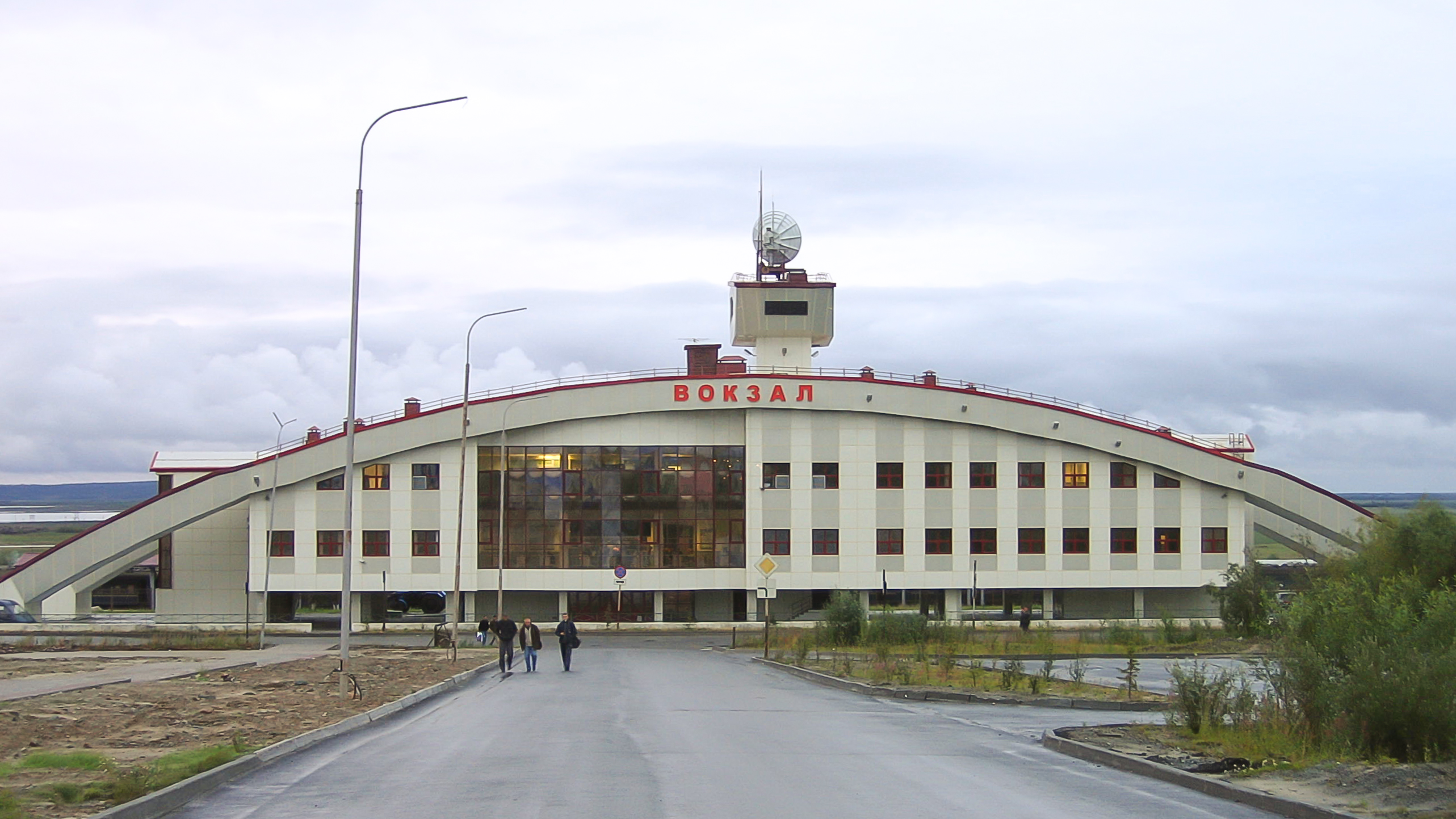 Вокзал города Лабытнанги, Ямало-Ненецкий АО, август 2006.